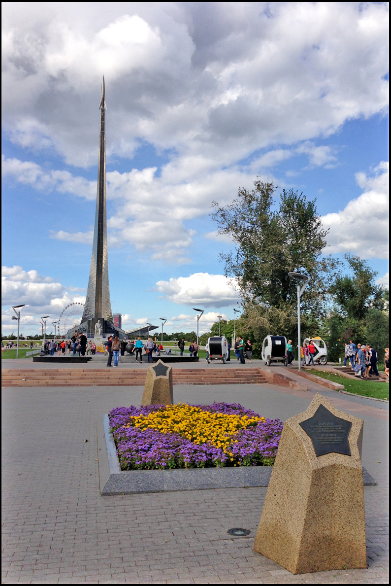 Аллея Космонавтов